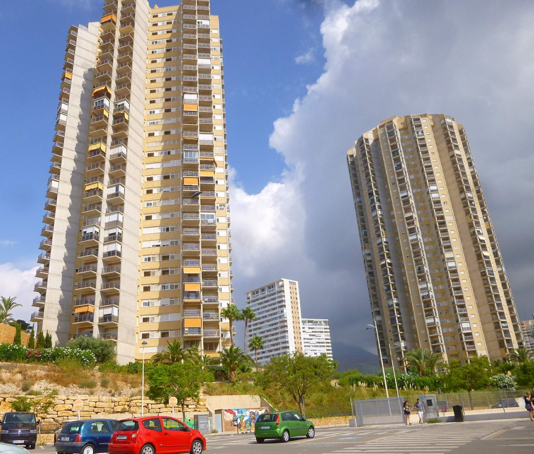 Benidorm - Edificios Sol de Poniente 1 y 2